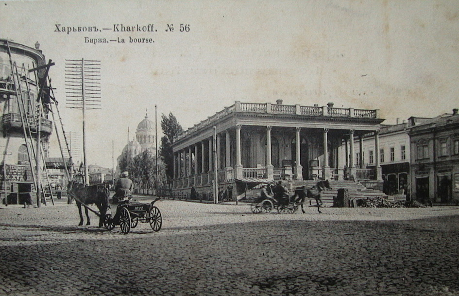 Old picture (postcard) @харьковская Биржа@ в центре Николаевской площади. Вид вверх в сторону Сумской улицы, сзади слева виден Николаевский собор.